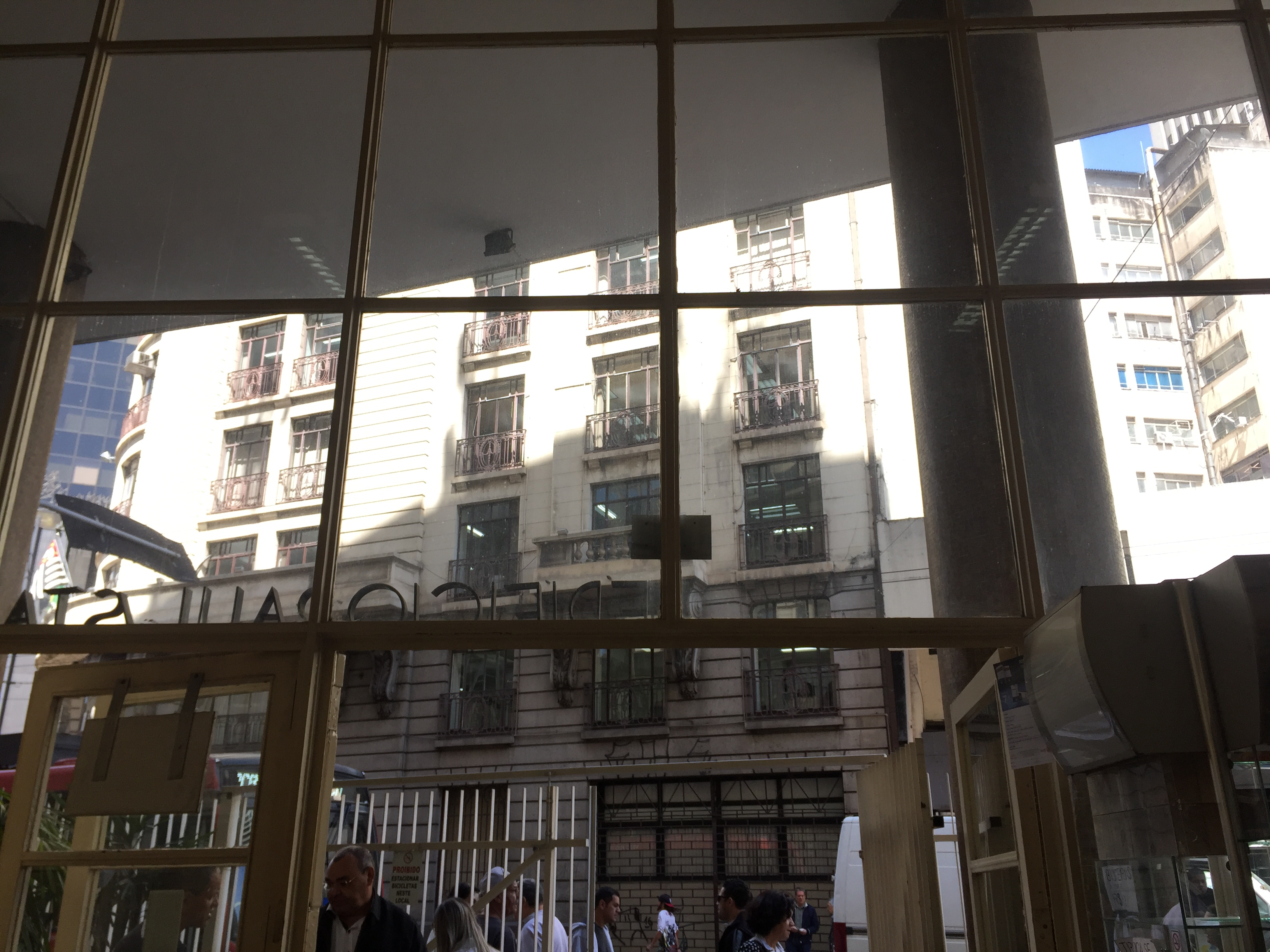 Vista da rua do Edifício Banco Paulista do Comércio, em São Paulo (SP), Brasil